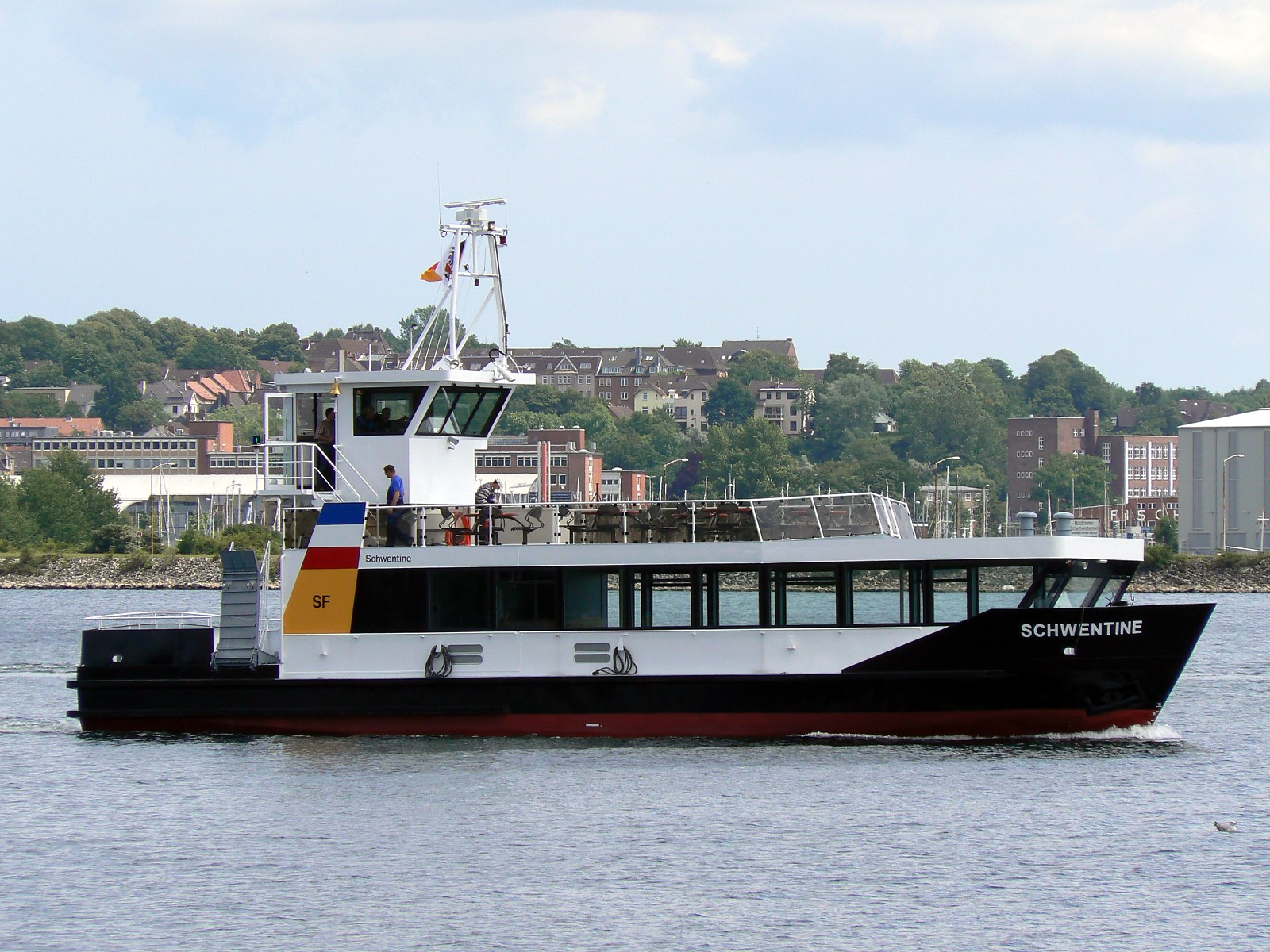 Fahrgastschiff Schwentine der Schlepp- und Fährgesellschaft Kiel. 2007 SSB Oortkaten, Hamburg IMO Number: MMSI Number: 211011948 Callsign: DJNN Length: 26 m Beam: 6 m Main engine 2x187 kW Volvo Diesel, 2 Schottel-Props Speed: 12 kts